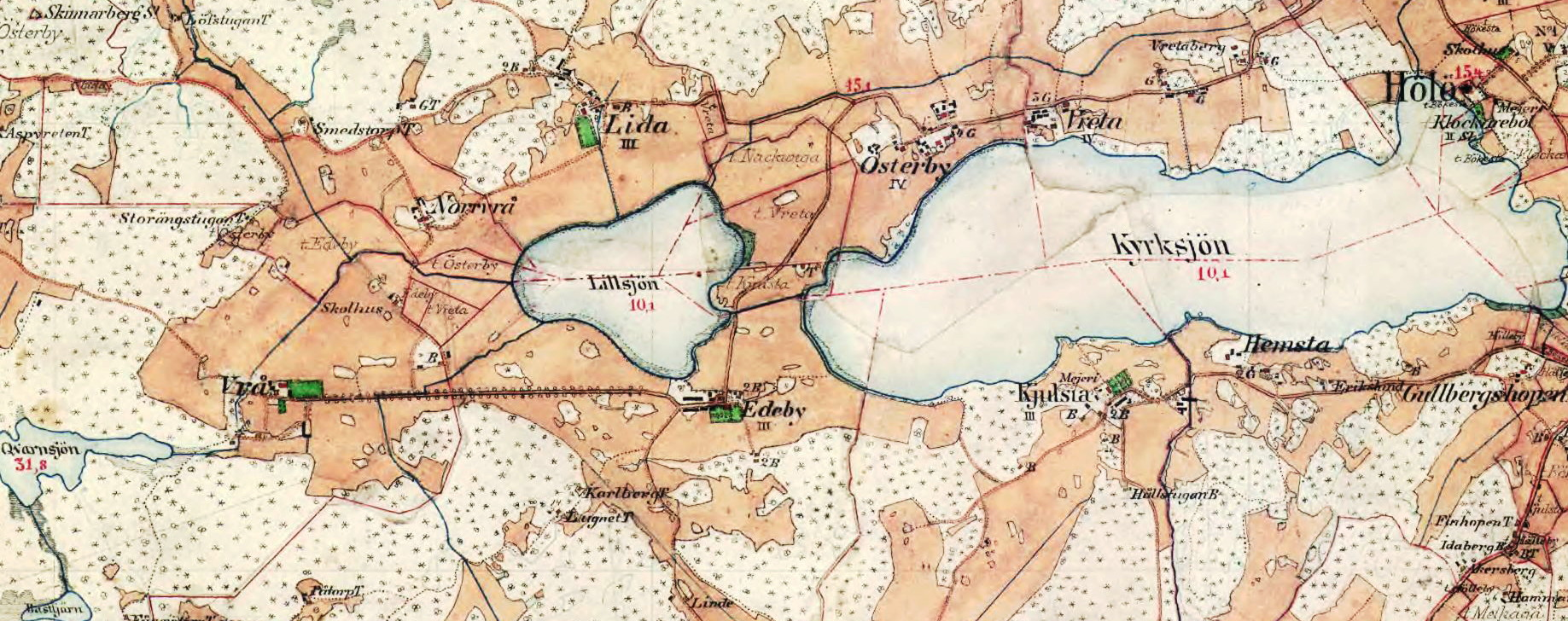 Gårdarna Edeby, Vrå, Lida och Hölö kyrka i Hölö socken